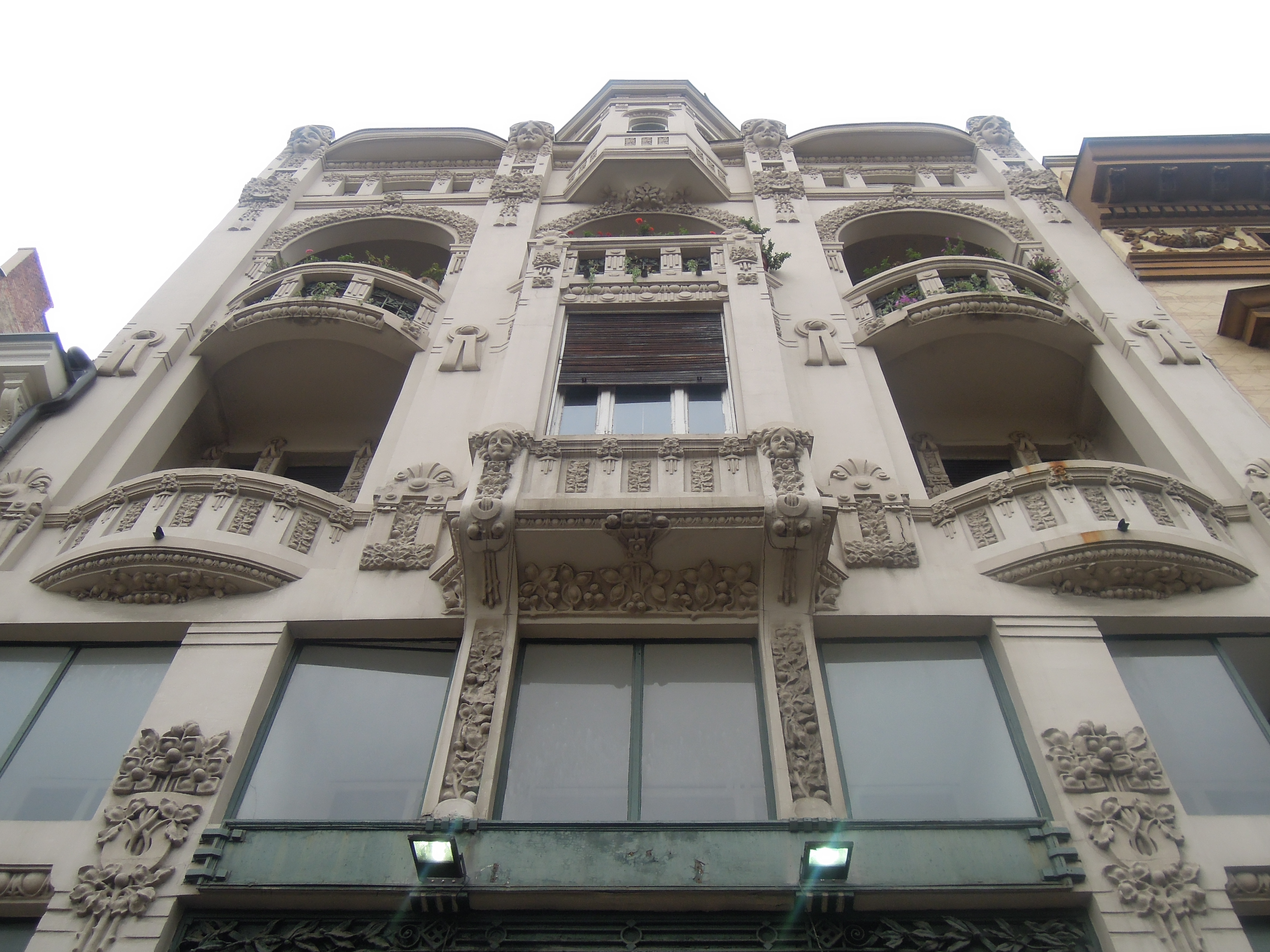 Зграда Смедеревске банке у Београду.